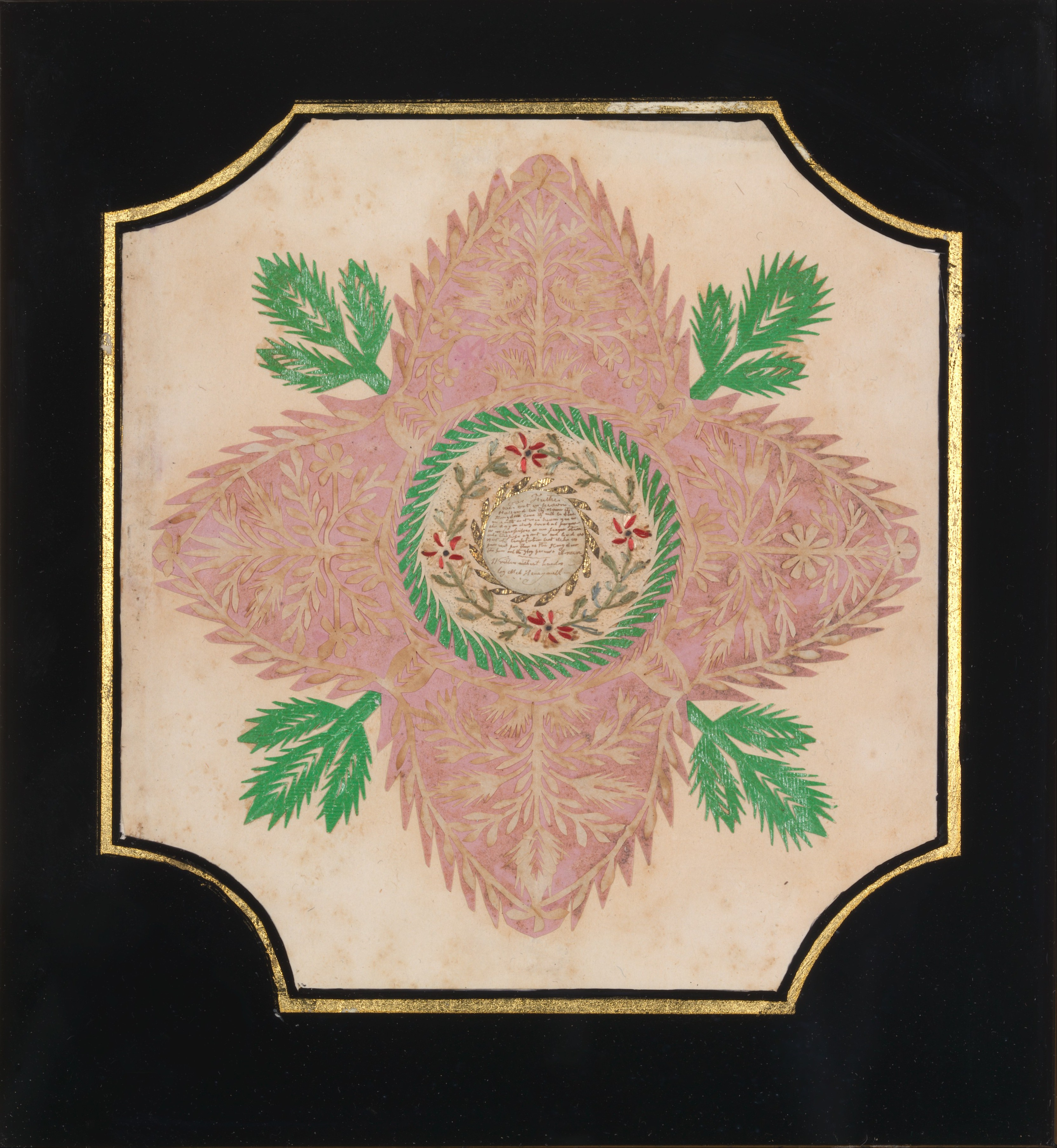 Cut Paper; Cut Paper